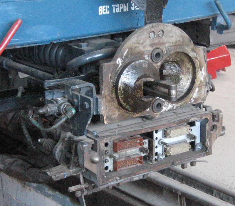 Сцепка и открытая клеммная коробка вагонов метро моделей 81-717/714